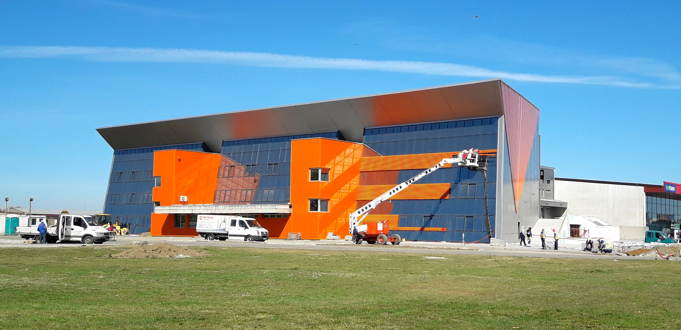 Sportska dvorana Servitium u Gradišci